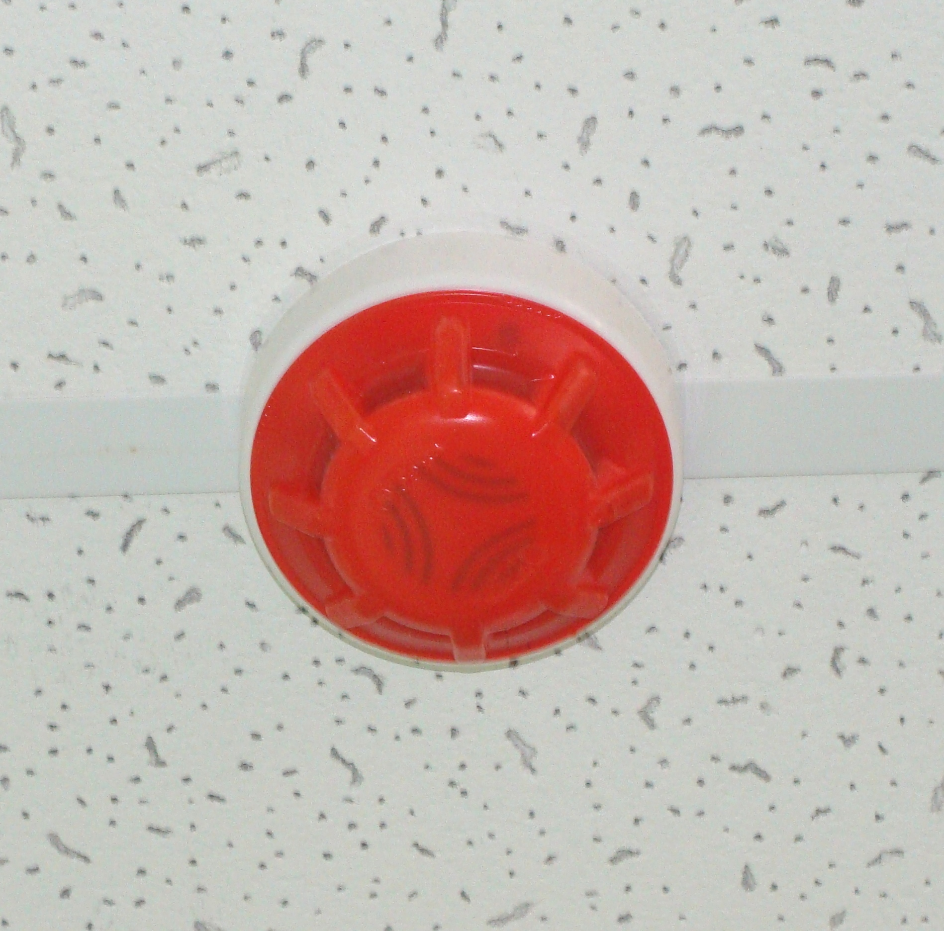 Точечный дымовой пожарный извещатель с заглушкой